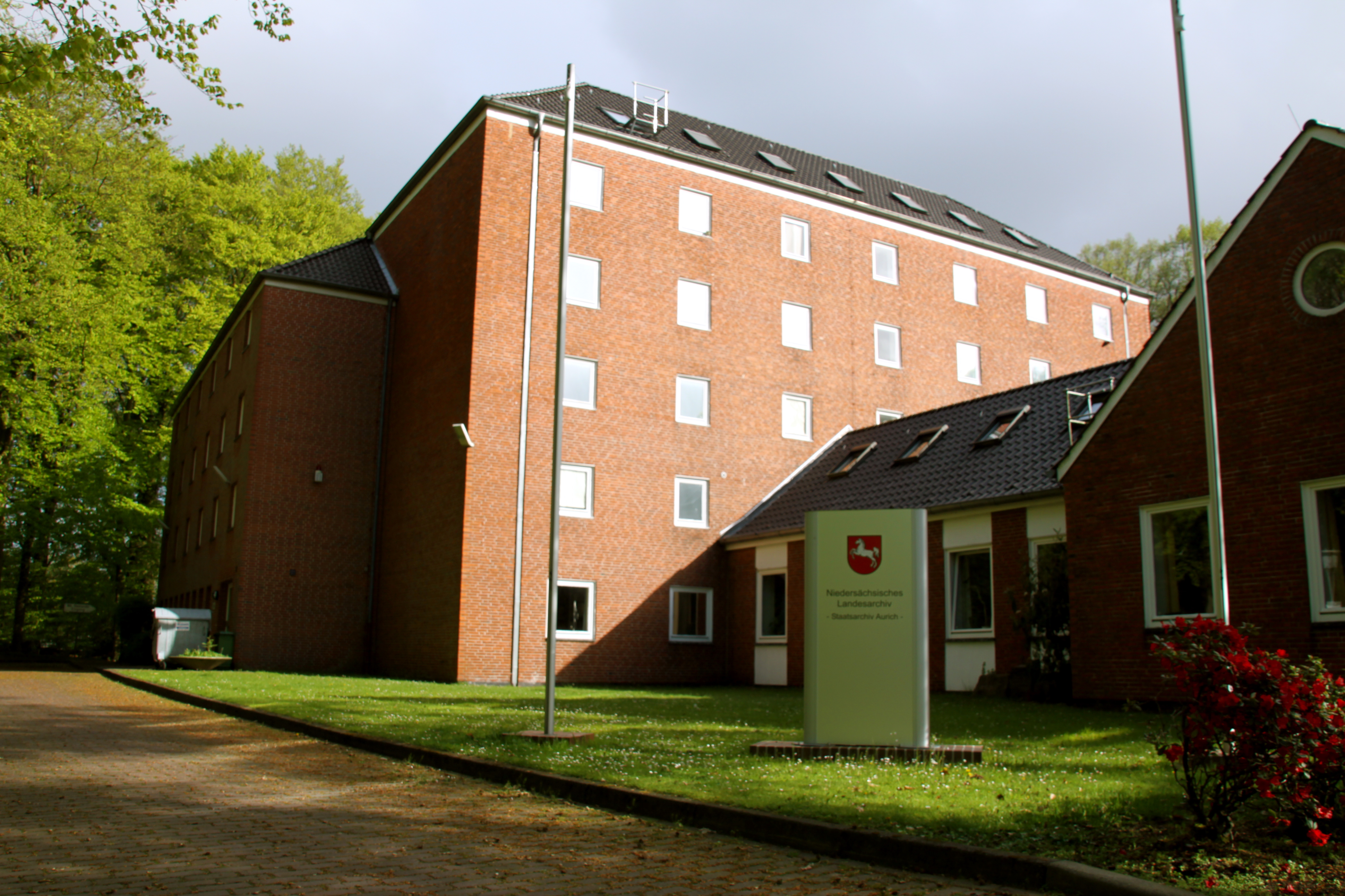 Staatsarchiv Aurich Dienstgebäude